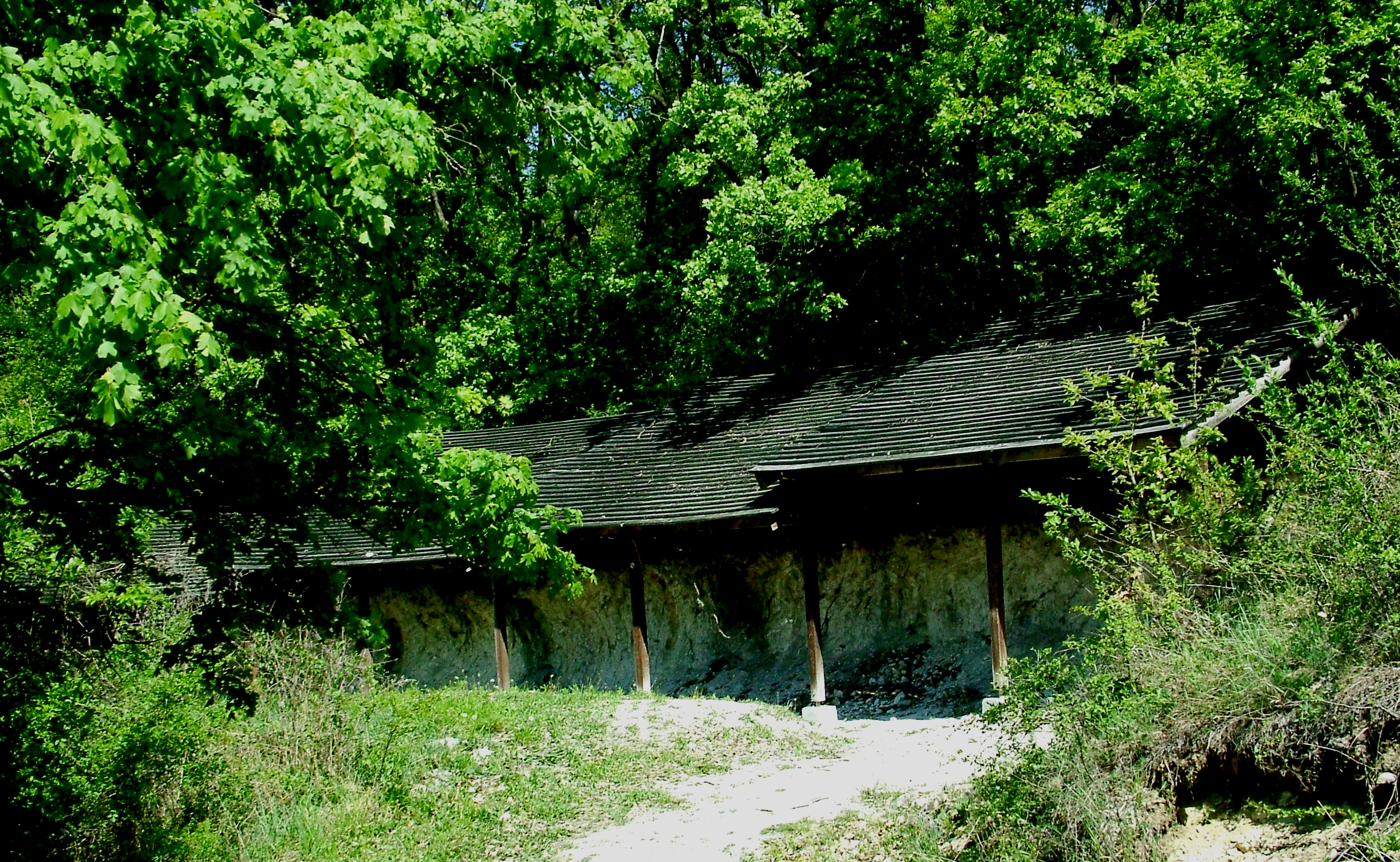 Felsőörsi Forrás-hegyi geológiai bemutatóhely